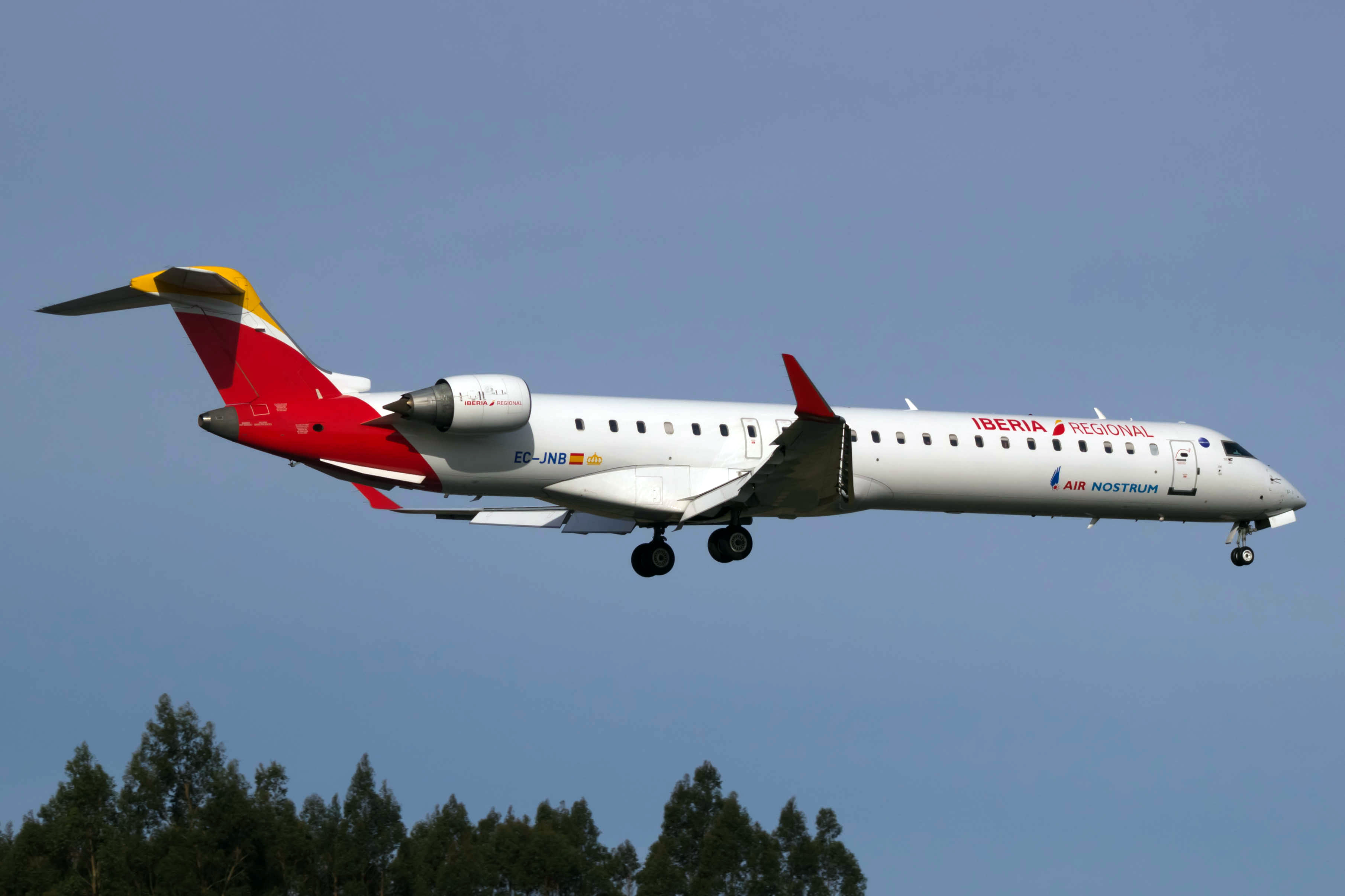 Bombardier CRJ900 de Air Nostrum aterrando no aeroporto de Santiago de Compostela.